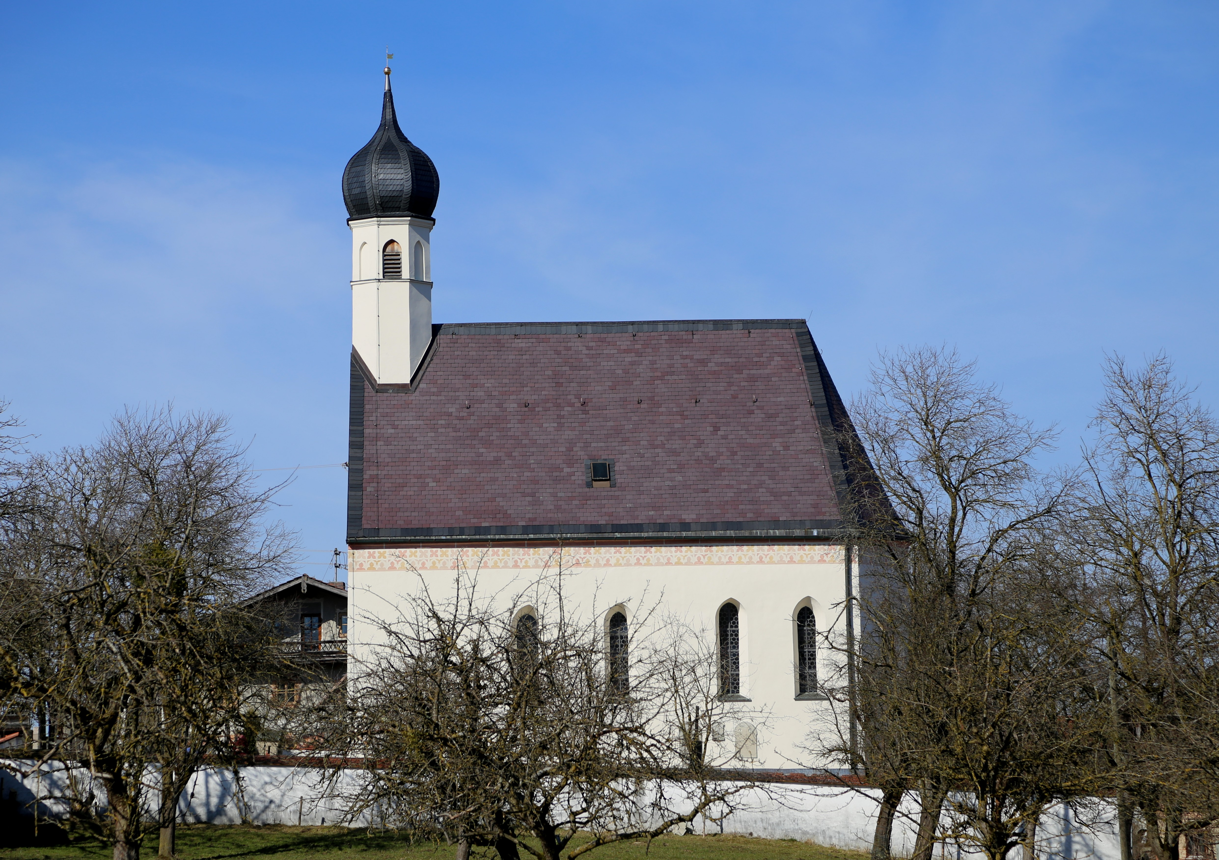 Gögging 9; Kath. Filialkirche St. Andreas und Vitus, Saalbau mit Satteldach und westlichem Dachreiter mit Zwiebelhaube, im Kern 2. Hälfte 15. Jh. mit älteren Langhausmauern, 1740 Barockisierung, 1842-47 Westteil und Turm erneuert sowie Sakristei angebaut; mit Ausstattung.